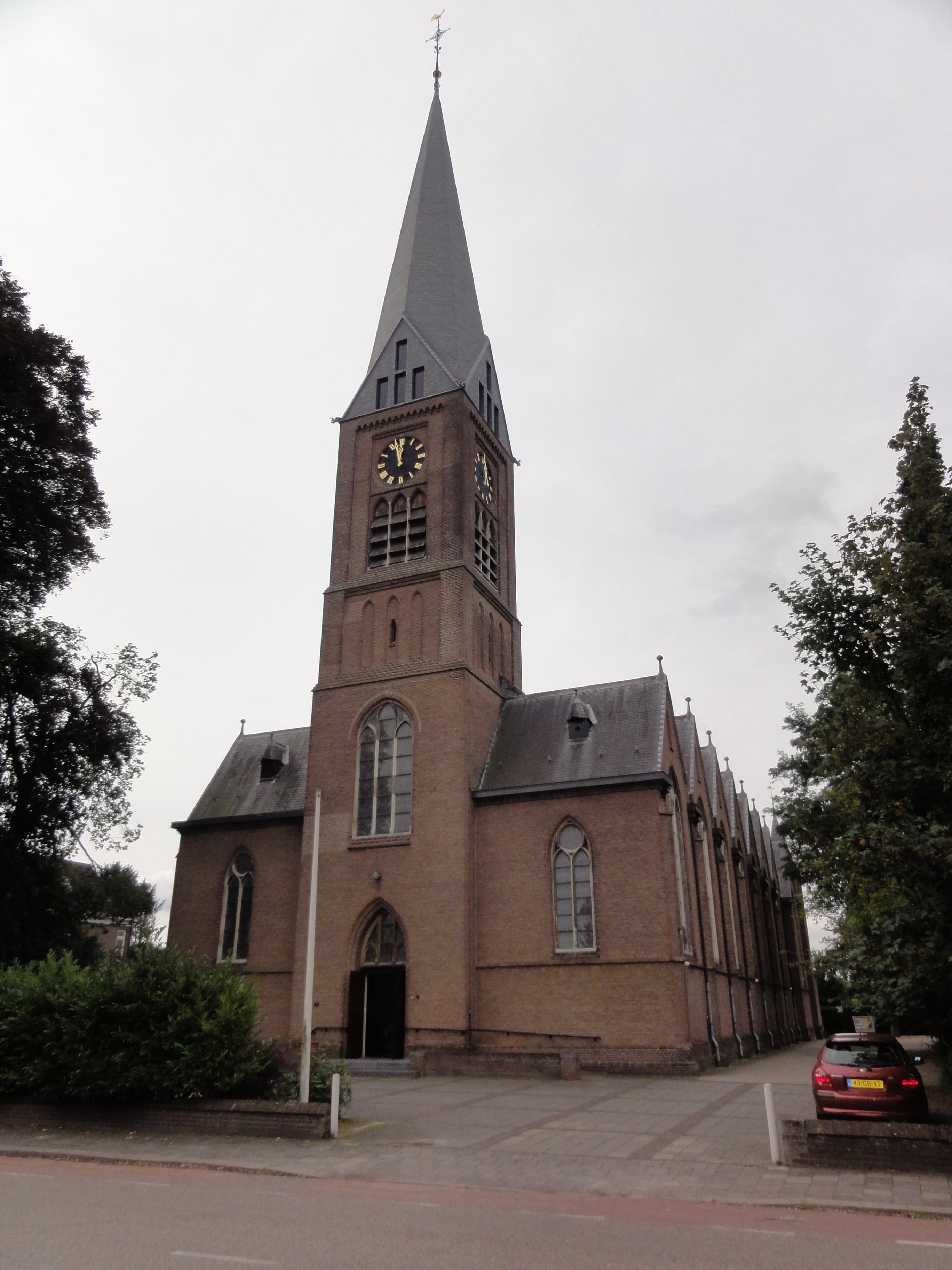 Nijmegen Rijksmonument 31204 kerk Dennenstraat 125